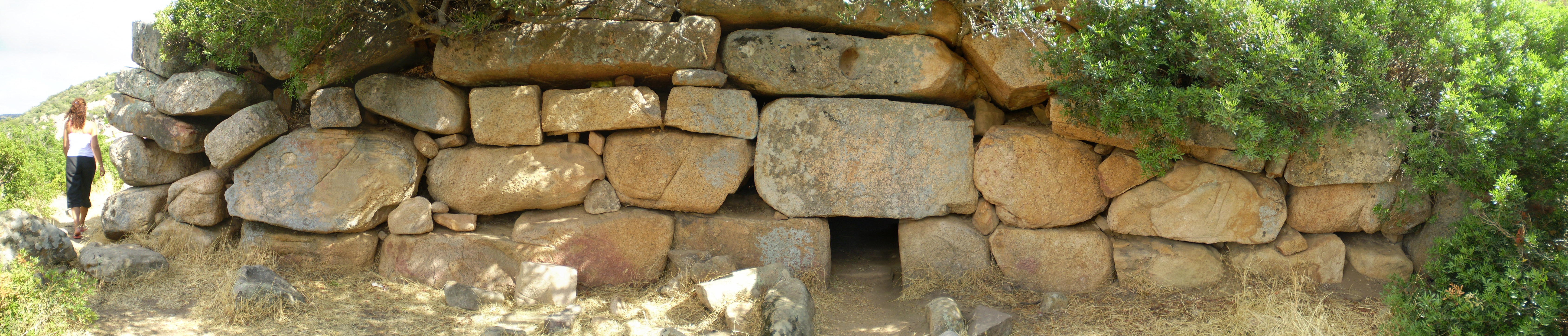 Tomba dei Giganti Barrancu Mannu, Santadi (CI)